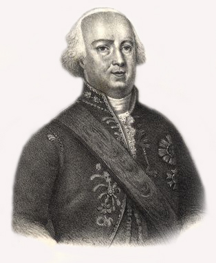 Rodrigo de Sousa Coutinho (1755-1812), conde de Linhares, militar e político português.